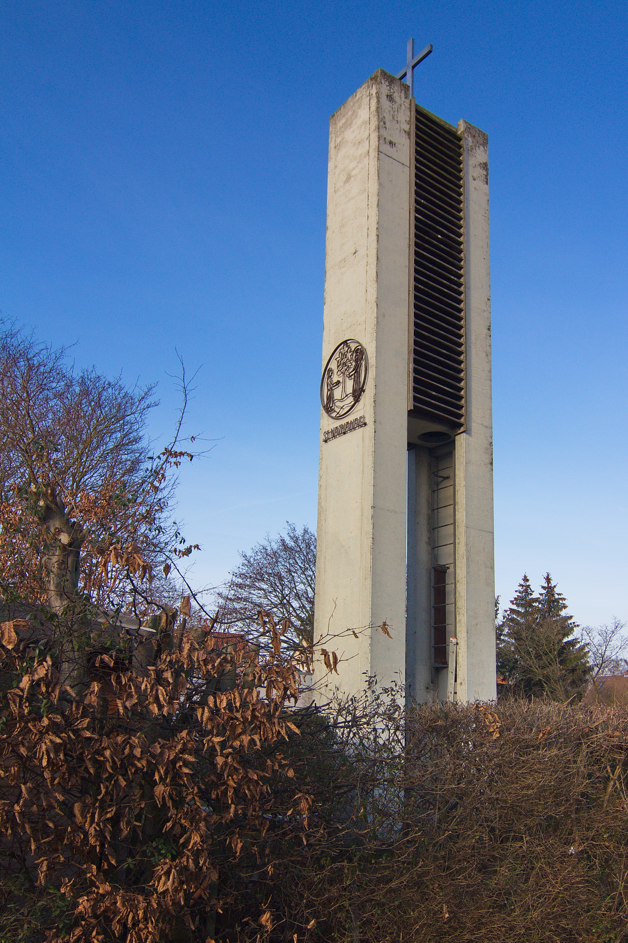 St.-Nathanael-Kirche in Bothfeld (Hannover), Niedersachsen, Deutschland